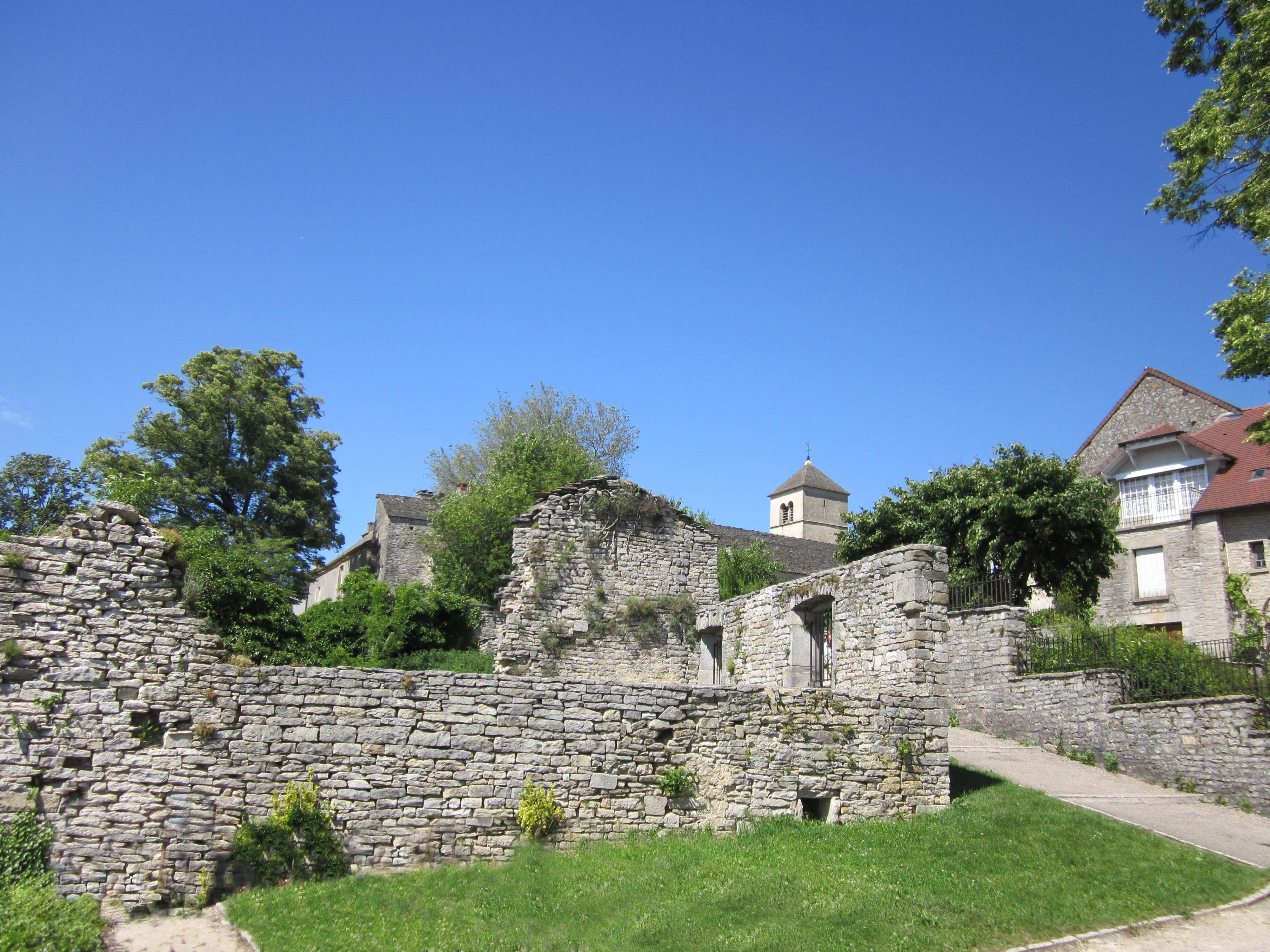 Vestiges de la demeure de madame Charlotte-Anne-Sophie-Désirée de Stain, dernière abbesse chanoinesse, de l'abbaye de Chateau-Chalon. Jura, France